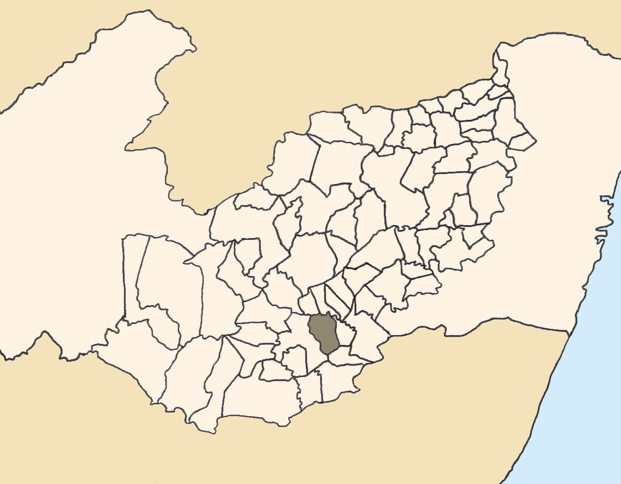 Mapa da mesorregião Agreste de Pernambuco (Brasil) subdivida em municípios. Em destaque, o município de São João. Map of the brazilian state of Pernambuco (mesorregião Agreste) showing the city of São João. Imagem tratada com o GIMP. Image made with GIMP.